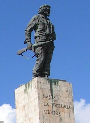 Monumento al Che Guevara en Santa Clara (frag)